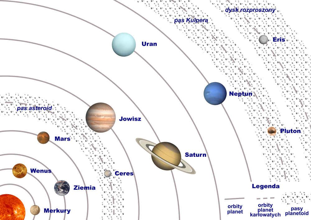 Did you know? Ceres – największa z wszystkich planetoid. Została odkryta jako pierwsza przez włoskiego astronoma Giuseppe Piazzi'ego 1 stycznia 1801 w obserwatorium astronomicznym w Palermo. Piazzi poszukiwał planety przewidzianej przez regułę Titiusa-Bodego. Ceres jest nieregularnego kształtu, można zaobserwować ją gołym okiem. Jej masa stanowi 1/3 całkowitej przypuszczalnej masy wszystkich planetoid z pasa planetoid. Eris - planeta karłowata, leżąca poza zdegradowanym Plutonem i nawet większa od niego.